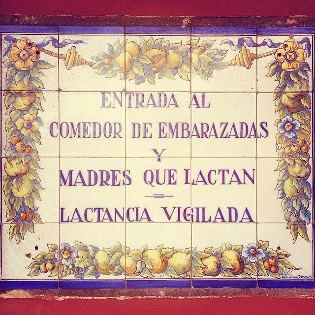 Placa que se encuentra situada en la puerta principal del Hogar Maternal Infantil de Gijón, hospital creado en 1949 para apoyar a las madres sin recursos.